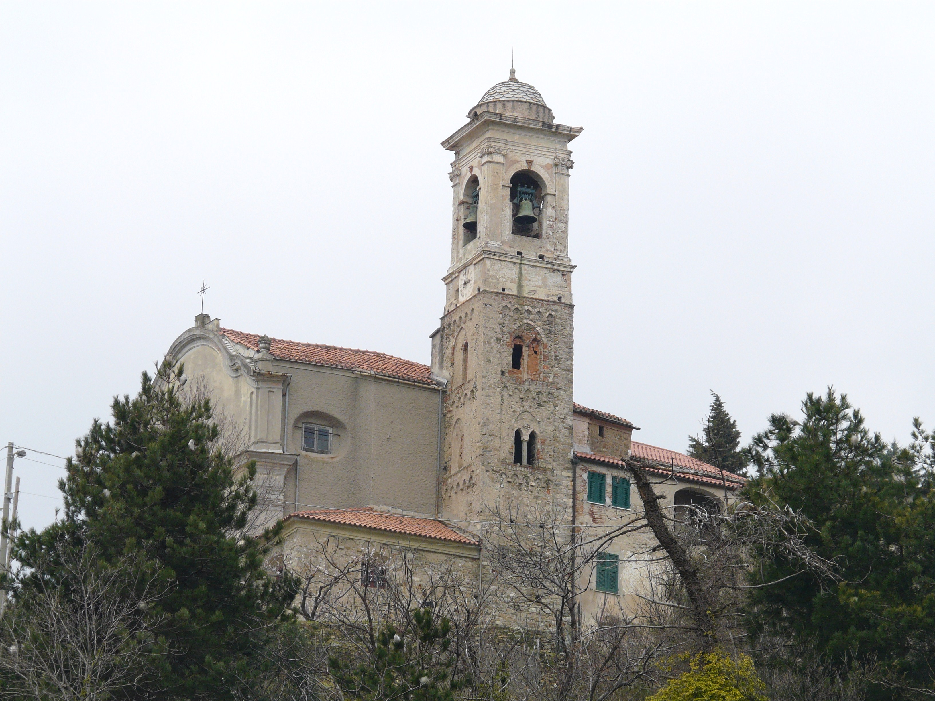 Chiesa di San Pietro, Rialto, Liguria, Italia